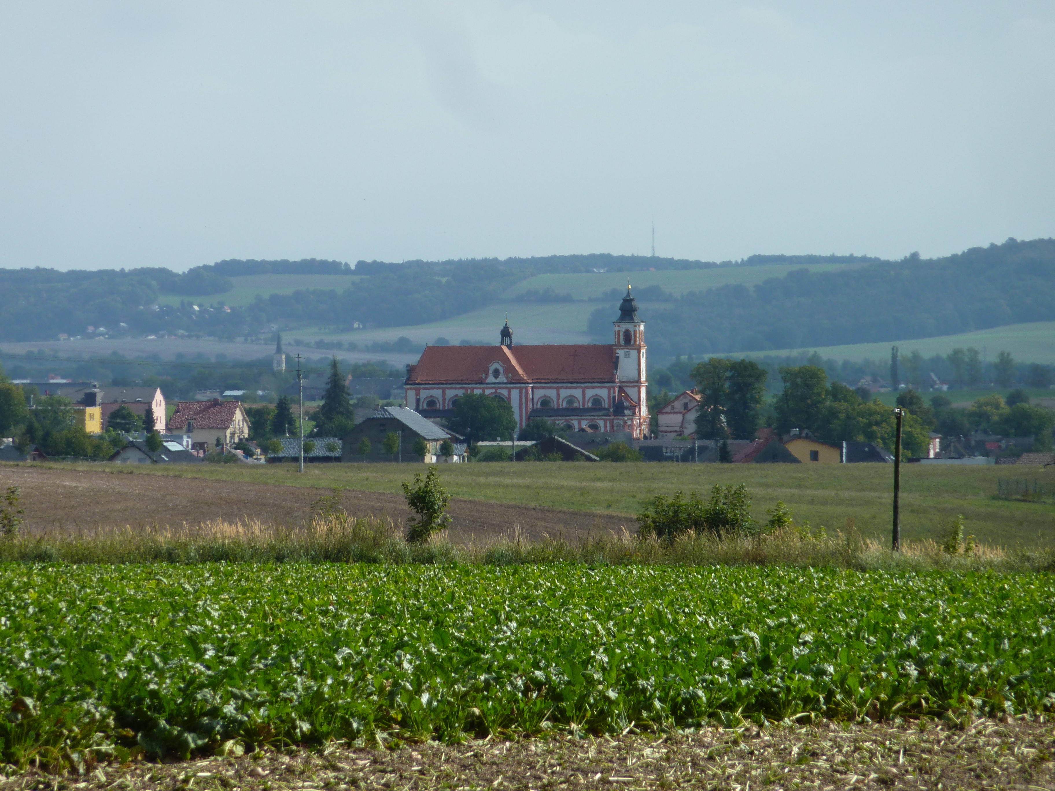 Bolatice, pohled na obec od Albertovce